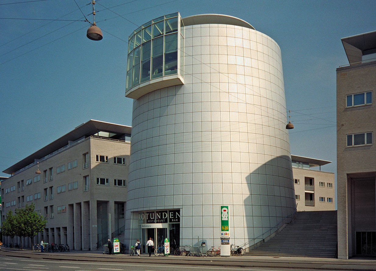 En cylindrisk byggnad, Rotunden i Hellerup, strax norr om Köpenhamn 2000.